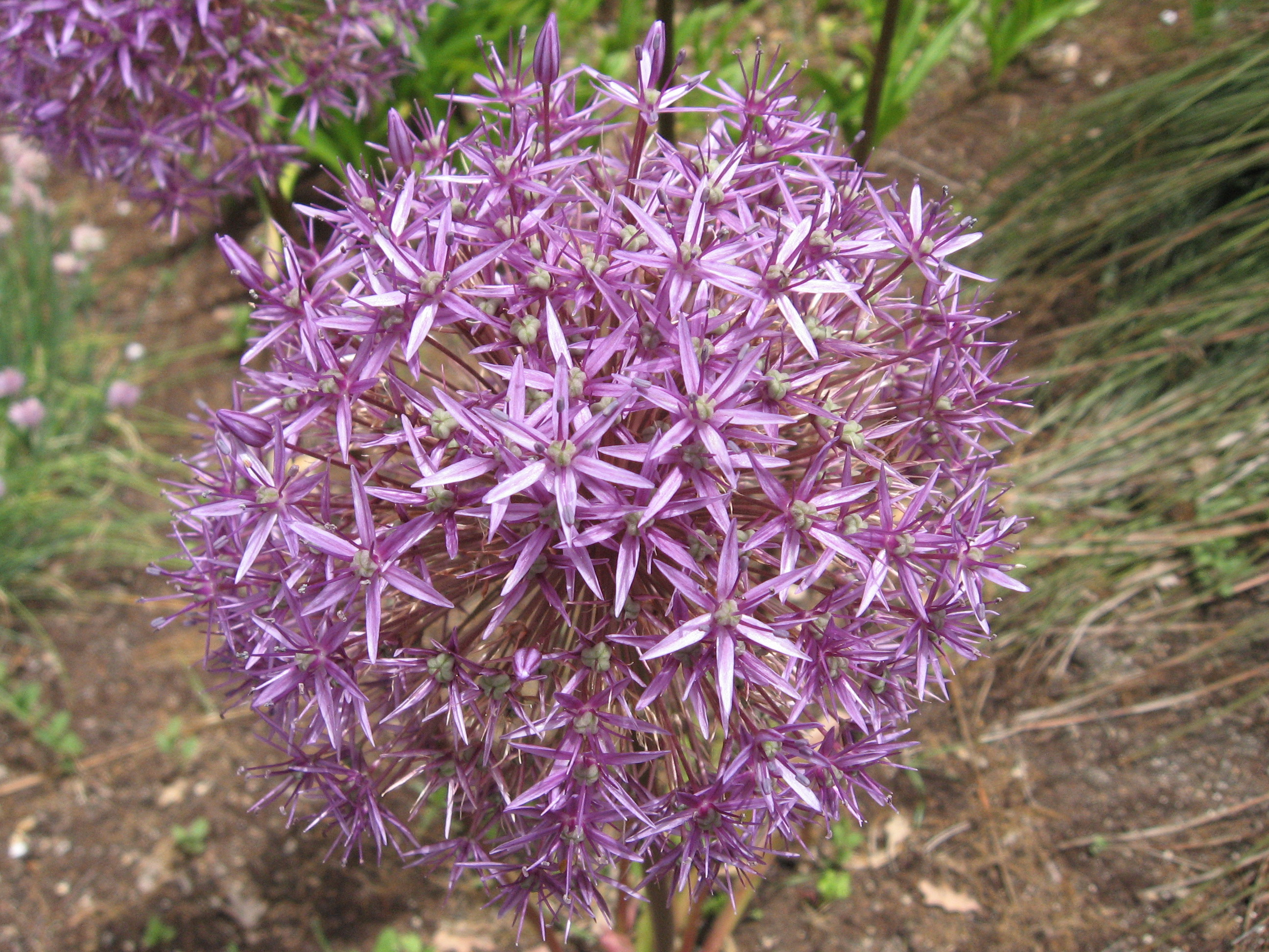 Allium giganteum. Real Jardín Botánico de Madrid.